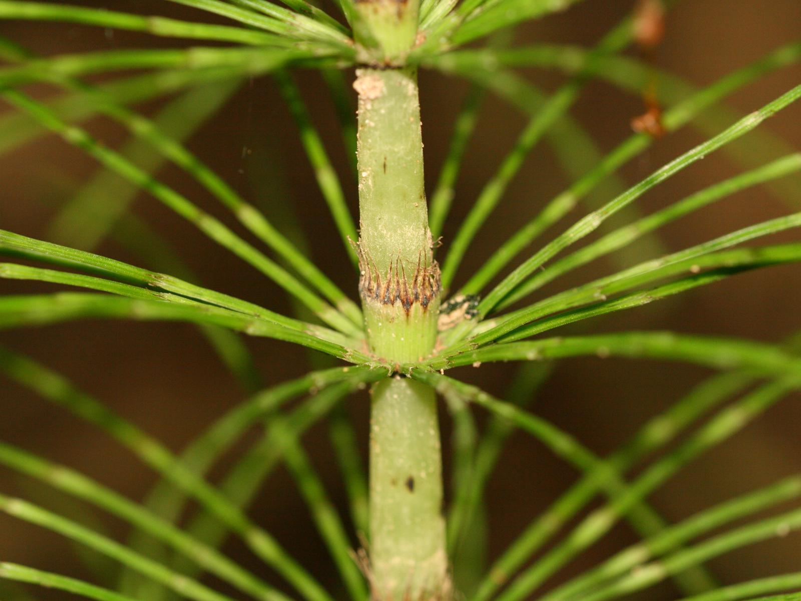 Riesen-Schachtelhalm (Equisetum telmateia)